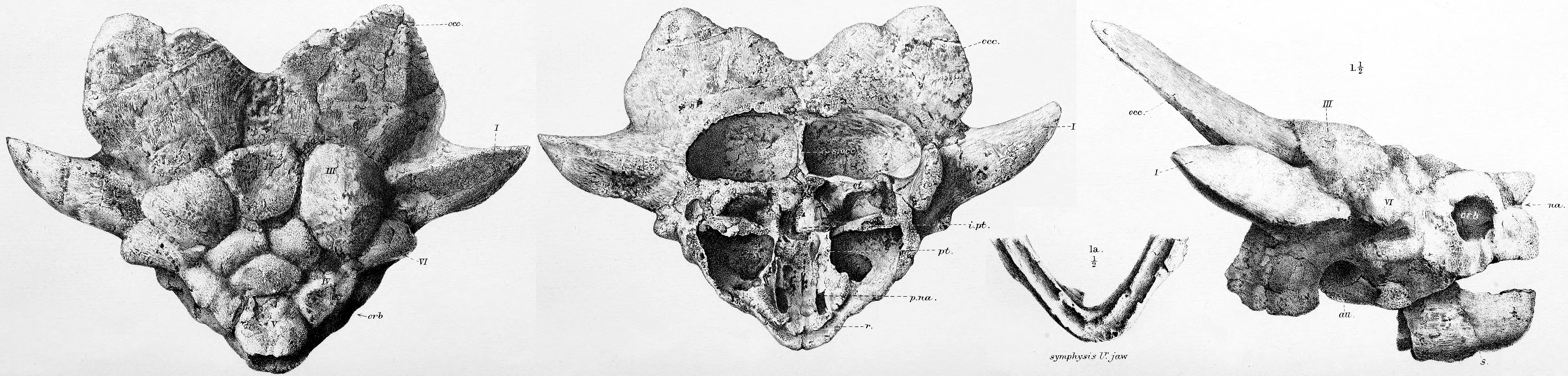 Niolamia ("Miolania") argentina skull.